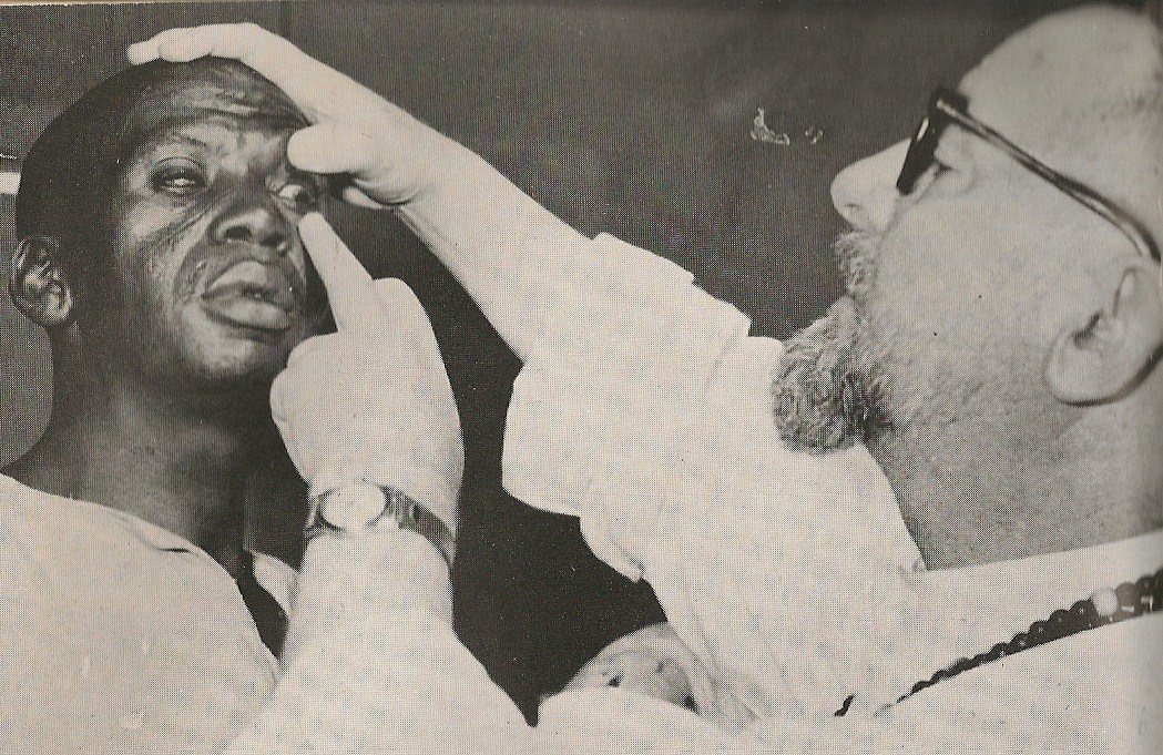 Portrait de Jean-Louis Goarnisson 3